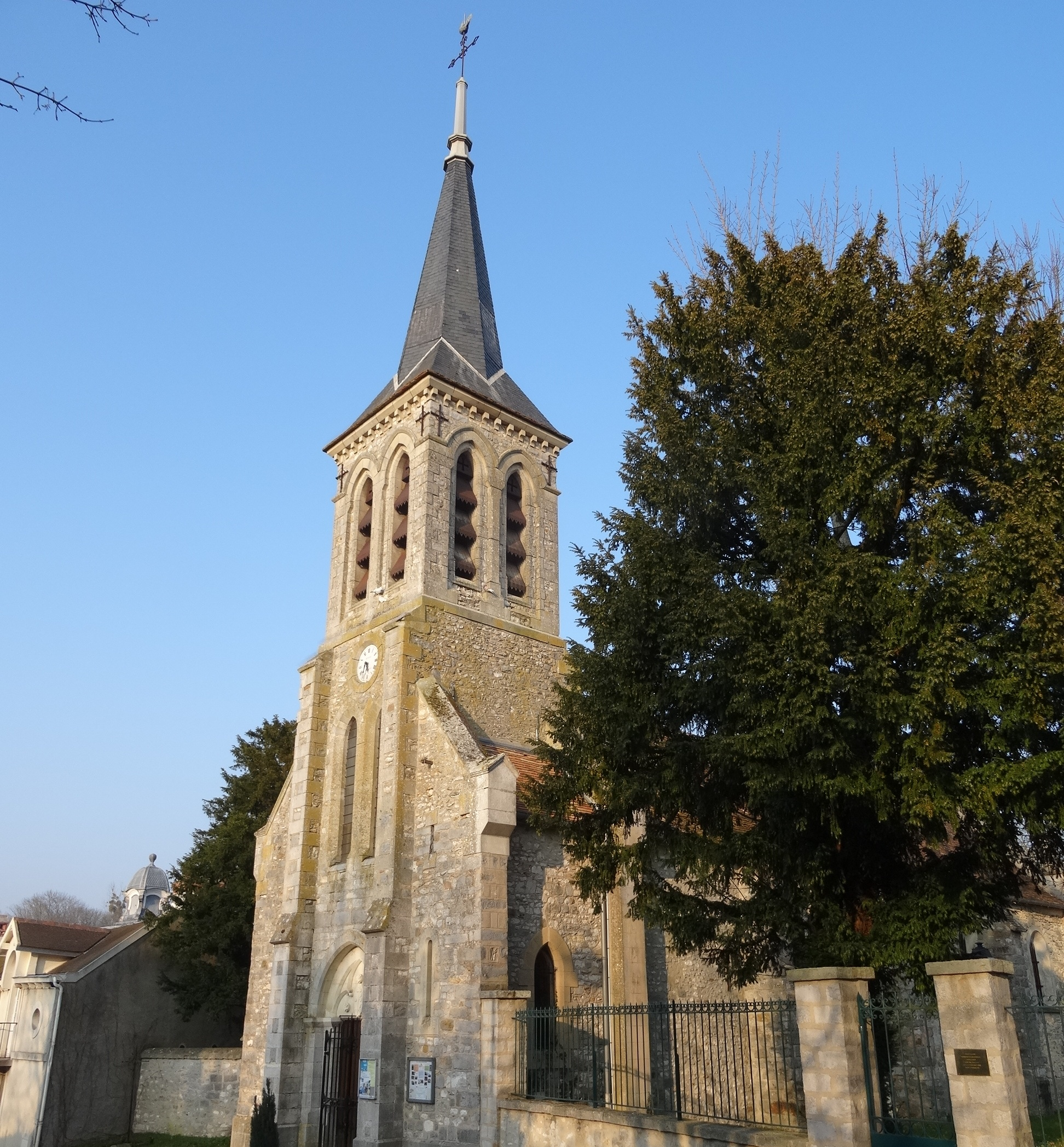 Église Saint-Nicolas de Rubelles. (Seine-et-Marne, région Île-de-France).